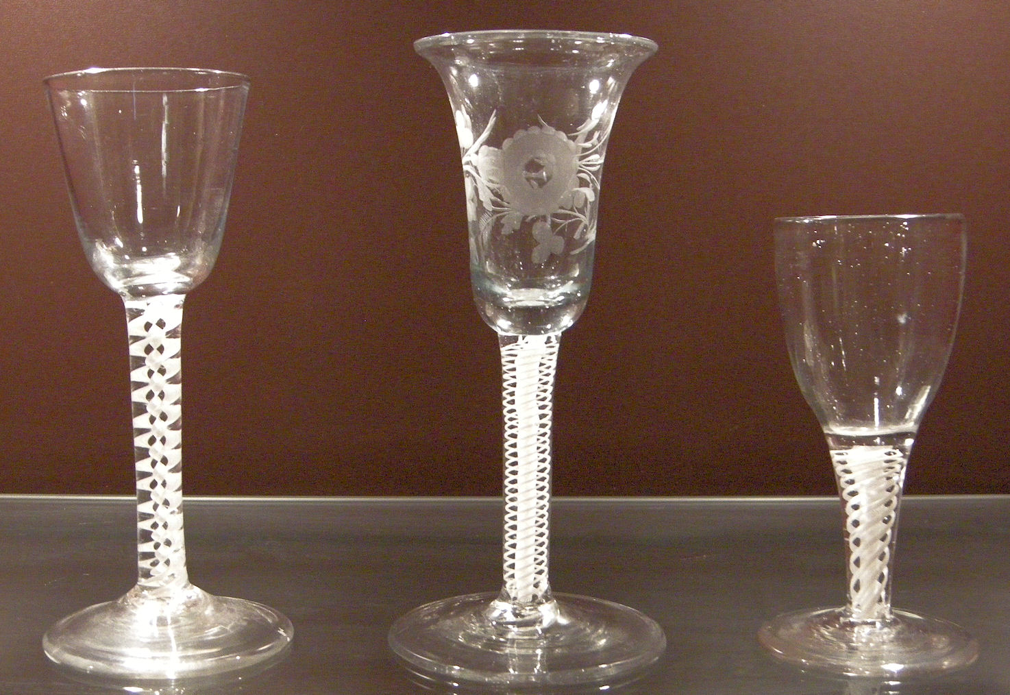 Slingerglazen. Links een Engels loodglas, rechts twee Hollandse sodaglazen.